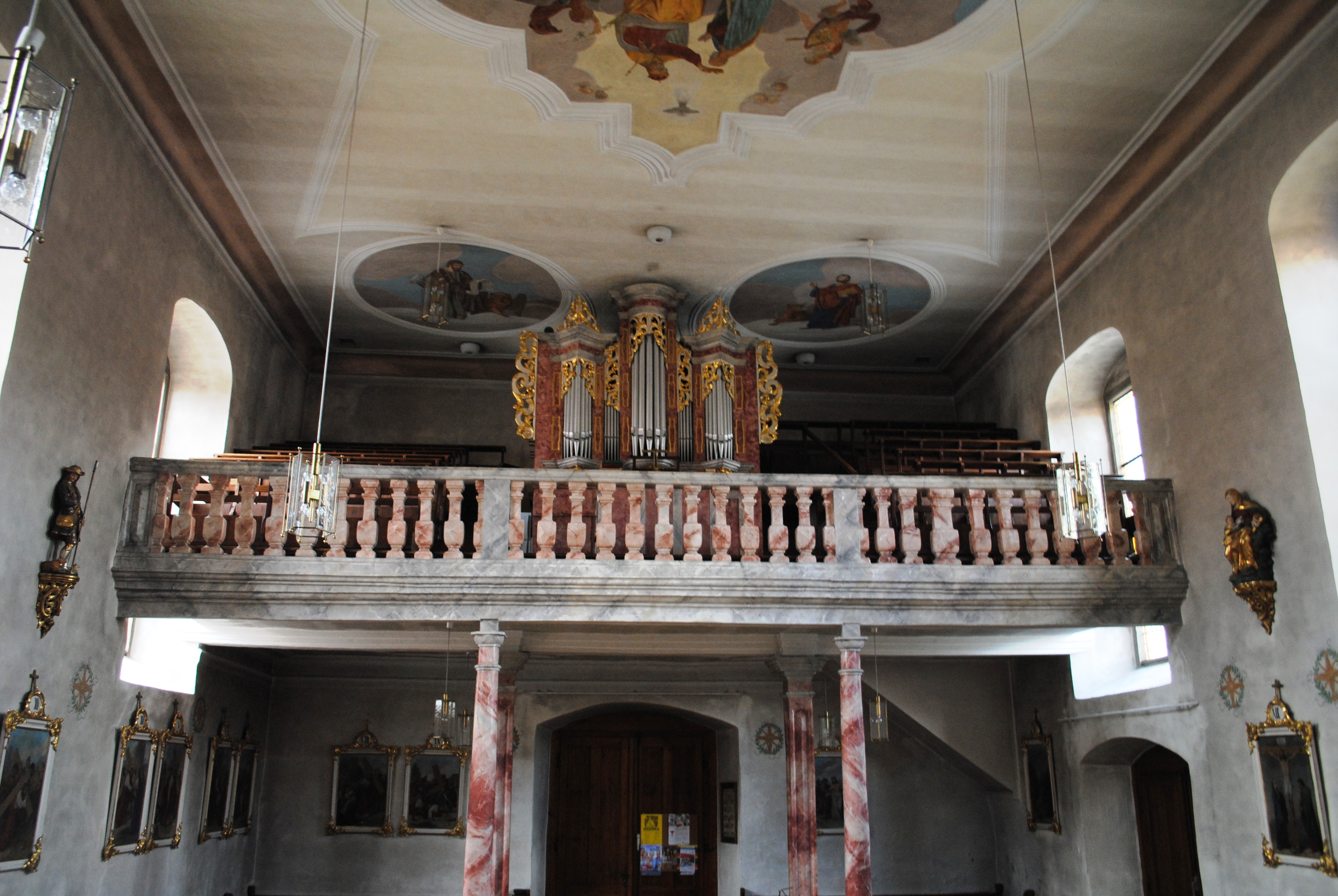 Orgel, Empore, Fahr